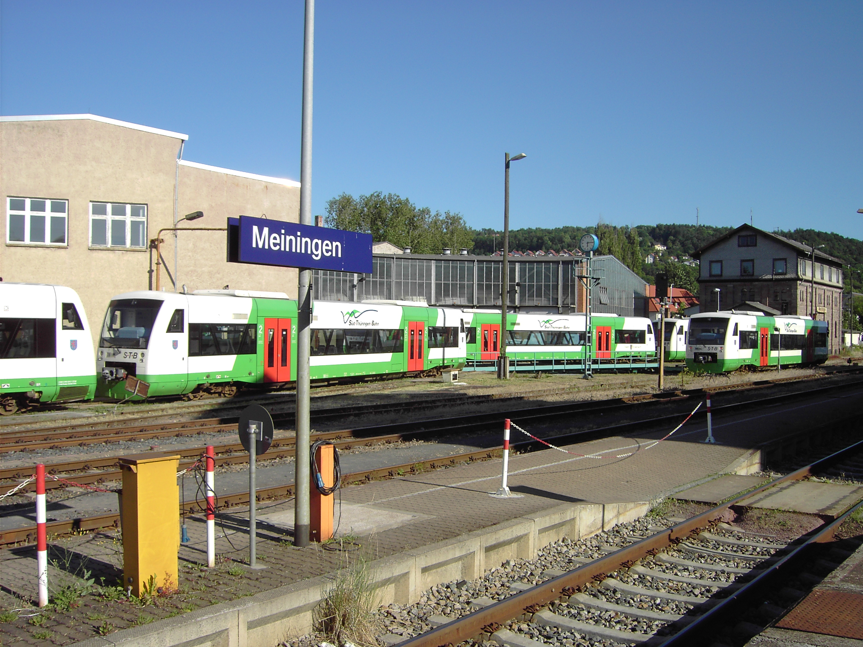 Mehrere Dieseltriebwagen des Typs RegioShuttle der Süd-Thüringen-Bahn abgestellt am Bahnhof Meiningen.